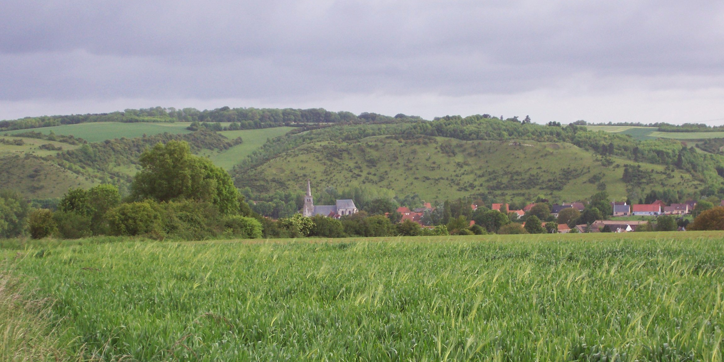 Commune de Wavrans sur l'Aa, dans le Pas-de-Calais en France. vue sur le village (habitat, église) et les coteaux.